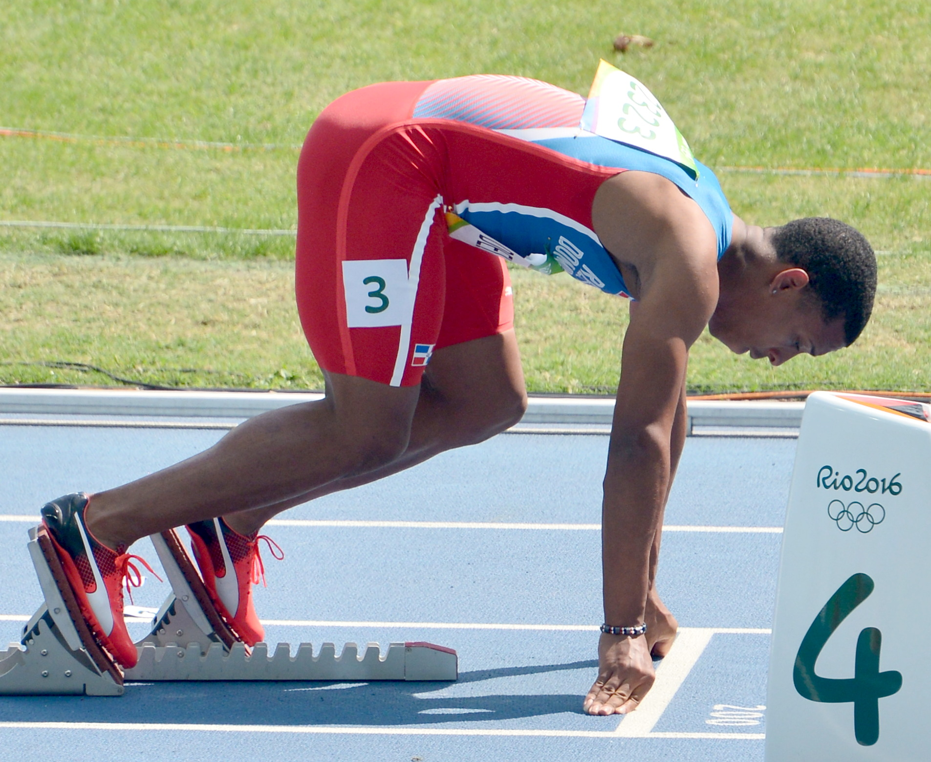 Séries du 200m Homme aux JO de Rio 2016